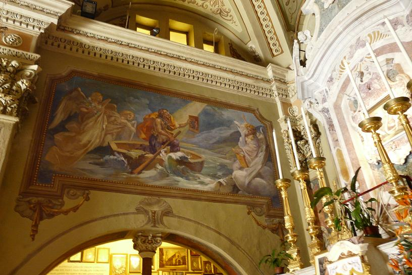 Foto varie del Santuario di Nostra Signora di Lampedusa, Castellaro, Liguria, Italia